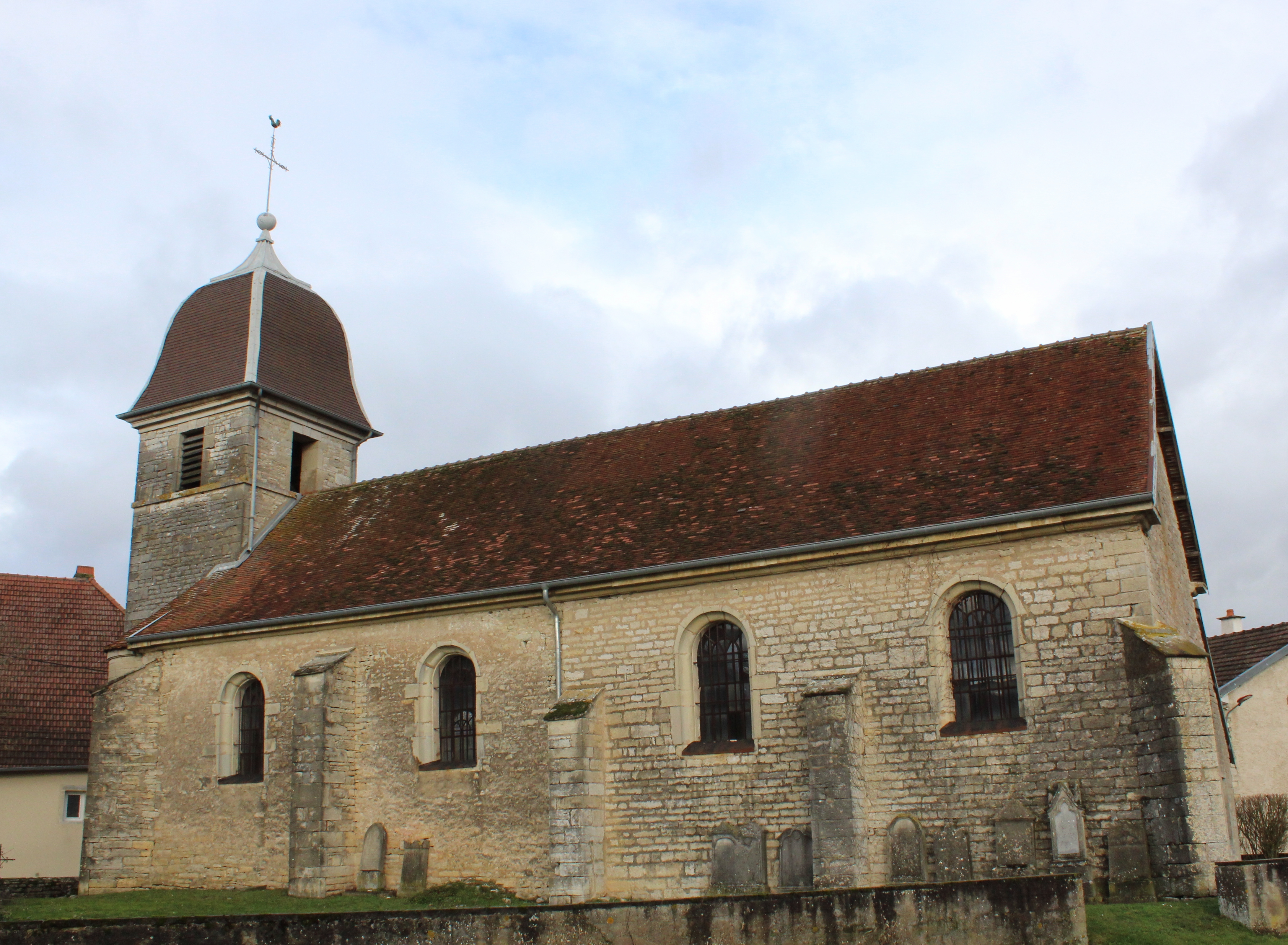 L'église